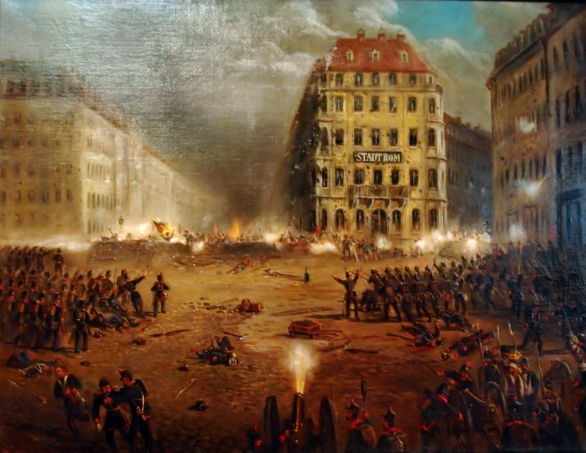 Truppen (Sächsische und Preußische) am Dresdner Neumarkt. Barrikaden der Aufständigen. „Hotel de Saxe“, Moritzstraße, „Hotel Stadt Rom“ (v.l.n.r).